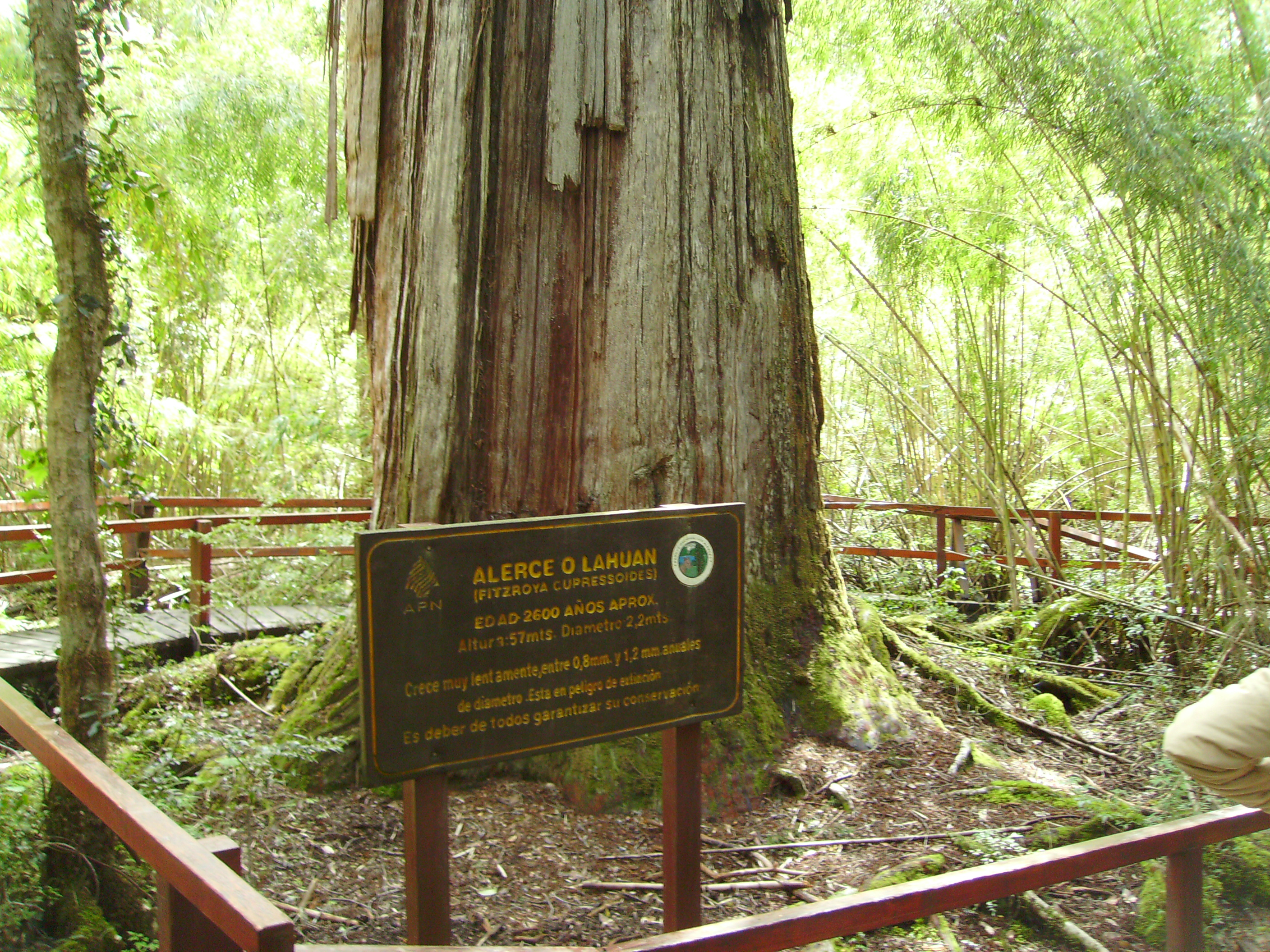 ALERCE O LAHUAN - Parque Nacional Los Alerces - Chubut - Argentina